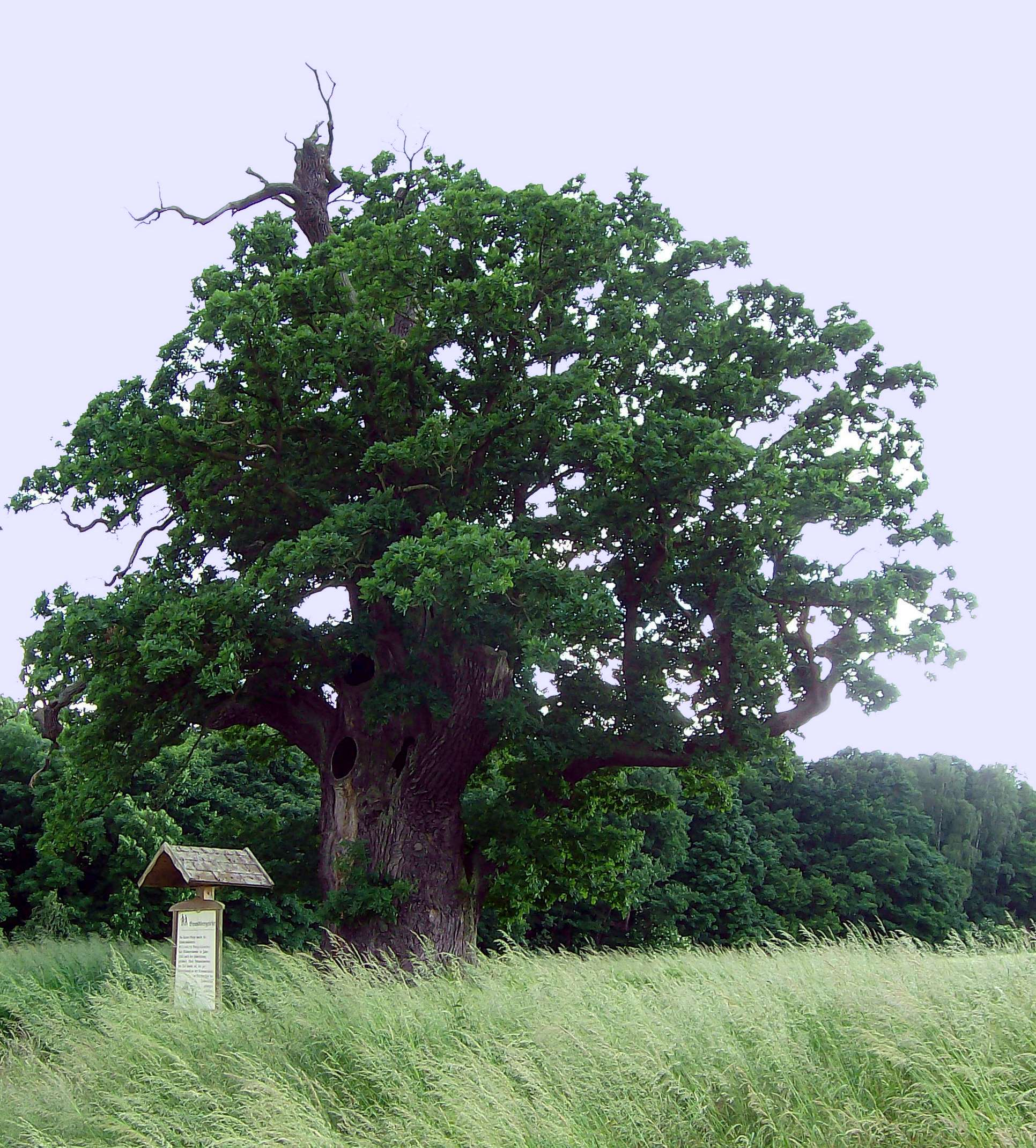 Naturdenkmal Brandbergeiche im Einetal bei Molmerswende